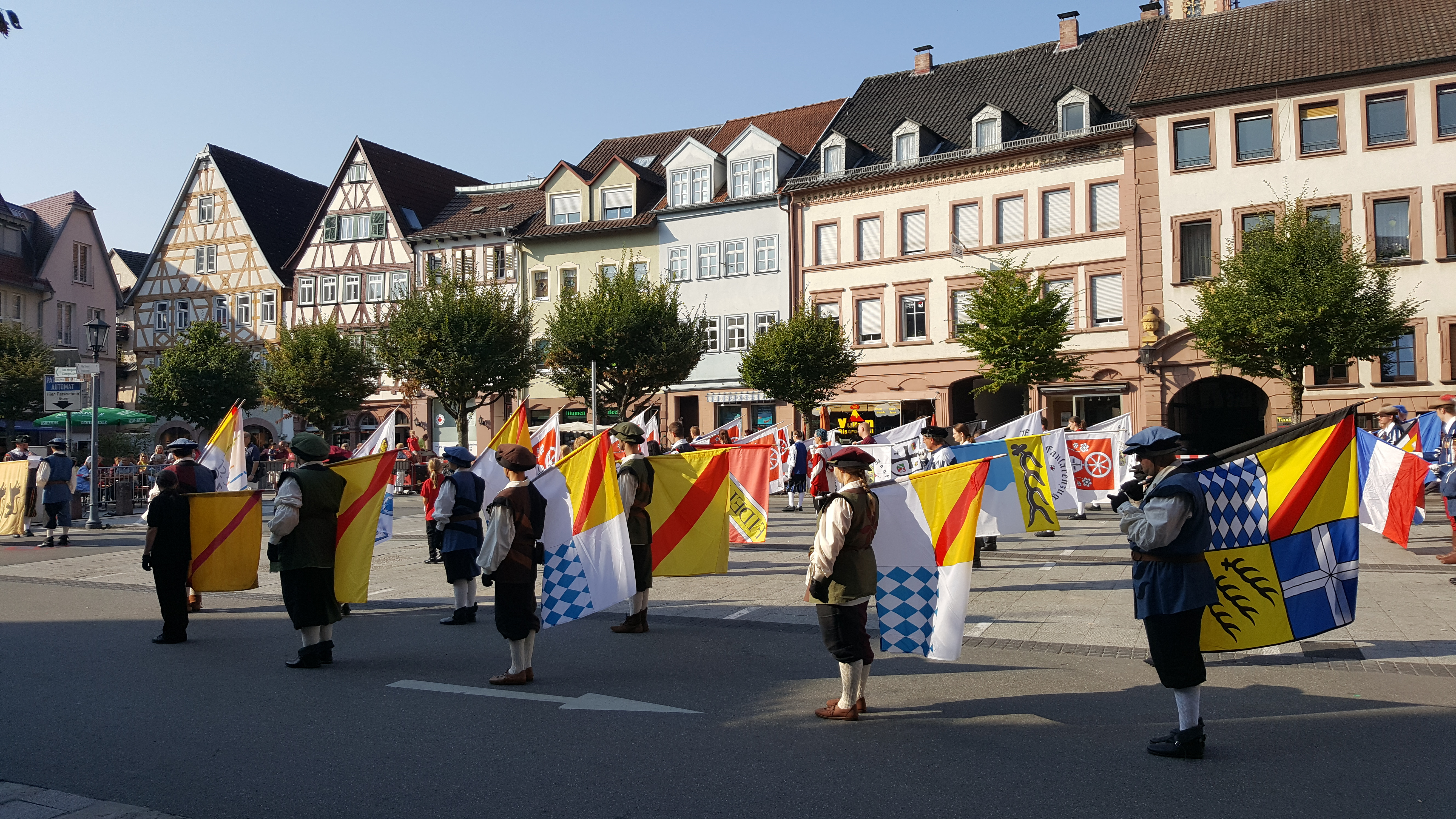 Die Weltmeisterschaft im Fahnenhochwerfen am 10. September 2016 in Tauberbischofsheim. Diese wurde vom Landesverband der Fahnenschwinger in Baden-Württemberg veranstaltet und vom Spielmannszug Tauberbischofsheim ausgerichtet. Mehr Informationen unter